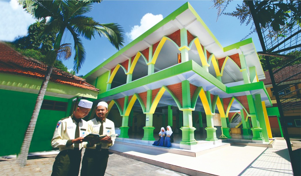 Masjid Al Kautsar SMK Negeri 1 Banyuwangi